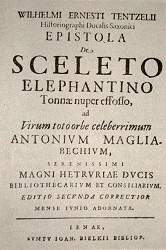 Wilhelm Ernst Tentzel (1659-1707): "Epistola de sceleto elephantino" 1696. / Frontispiz der wissenschaftlichen Darstellung über den Fund des Skeletts eines prähistorischen Elefanten im Jahr 1695 bei Burgtonna in Thüringen.